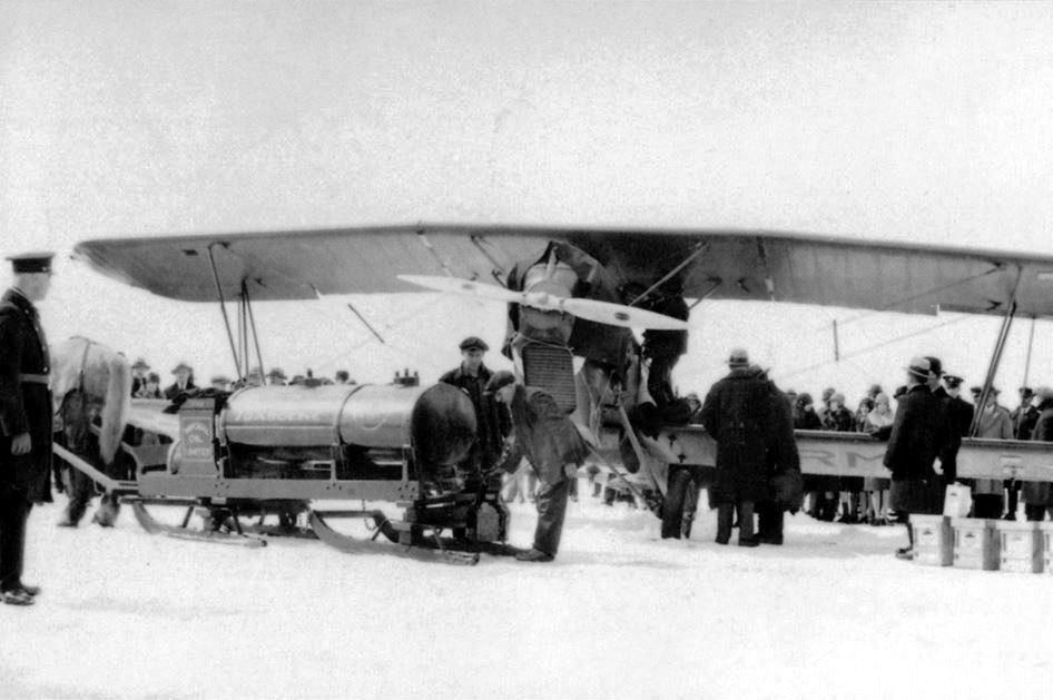 Charles Lindbergh à Québec, 1928 « En 1928, l'aviateur américain Charles Lindberg est venu à Québec livrer un sérum spécial pour son ami Floyd Bennett, hospitalisé au Jeffery Hale, situé à cette époque sur le boulevard Saint-Cyrille (devenu le boulevard René-Lévesque), en face du Grand Théâtre actuel. L'avion de Lindberg atterrit sur les plaines d'Abraham vers 18h45, le mardi 24 avril. En mettant pied à terre, l'aviateur américain se fit conduire avec son sérum auprès de Bennett. Devant participer à l'expédition de l'amiral Byrd vers le pôle Sud, Bennett voulut, en dépit de son état de santé, se joindre au groupe d'Américains et de Canadiens qui tentaient de se porter au secours de deux aviateurs allemands et d'un Irlandais, à bord du Bremen, qui avait dû atterrir d'urgence sur l'île Greenly, dans le détroit de Belle-Isle. Bennett était au Lac Sainte-Agnès, dans Charlevoix, lorsqu'il développa une pneumonie. Transporté d'urgence à Québec, on fit le nécessaire pour le sauver, mais en vain. L'aviateur décédait, le matin du mercredi 25 avril à 10h40. Vers 11h, Lindberg prenait son envol pour un retour aux États-Unis, où il apprit en arrivant que son ami était décédé. Il aura fallu un échec du Bremen ainsi que la maladie grave de Floyd Bennett pour que la ville de Québec soit honorée par une très brève visite du grand As de l'aviation américaine. L'année précédente, Charles Lindberg avait réalisé son exploit de faire le trajet New York-Paris, sans escale, en 33 heures, en solitaire à bord du Spirit of St. Louis. » – René Bureau